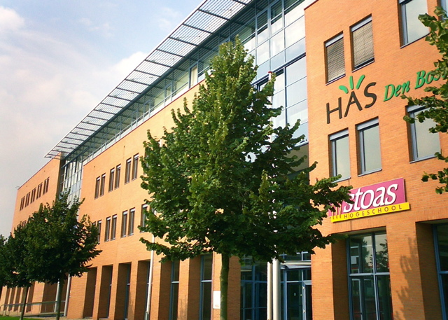 Zicht op een deel van HAS Den Bosch, Onderwijsboulevard 221, 5223 DE 's-Hertogenbosch